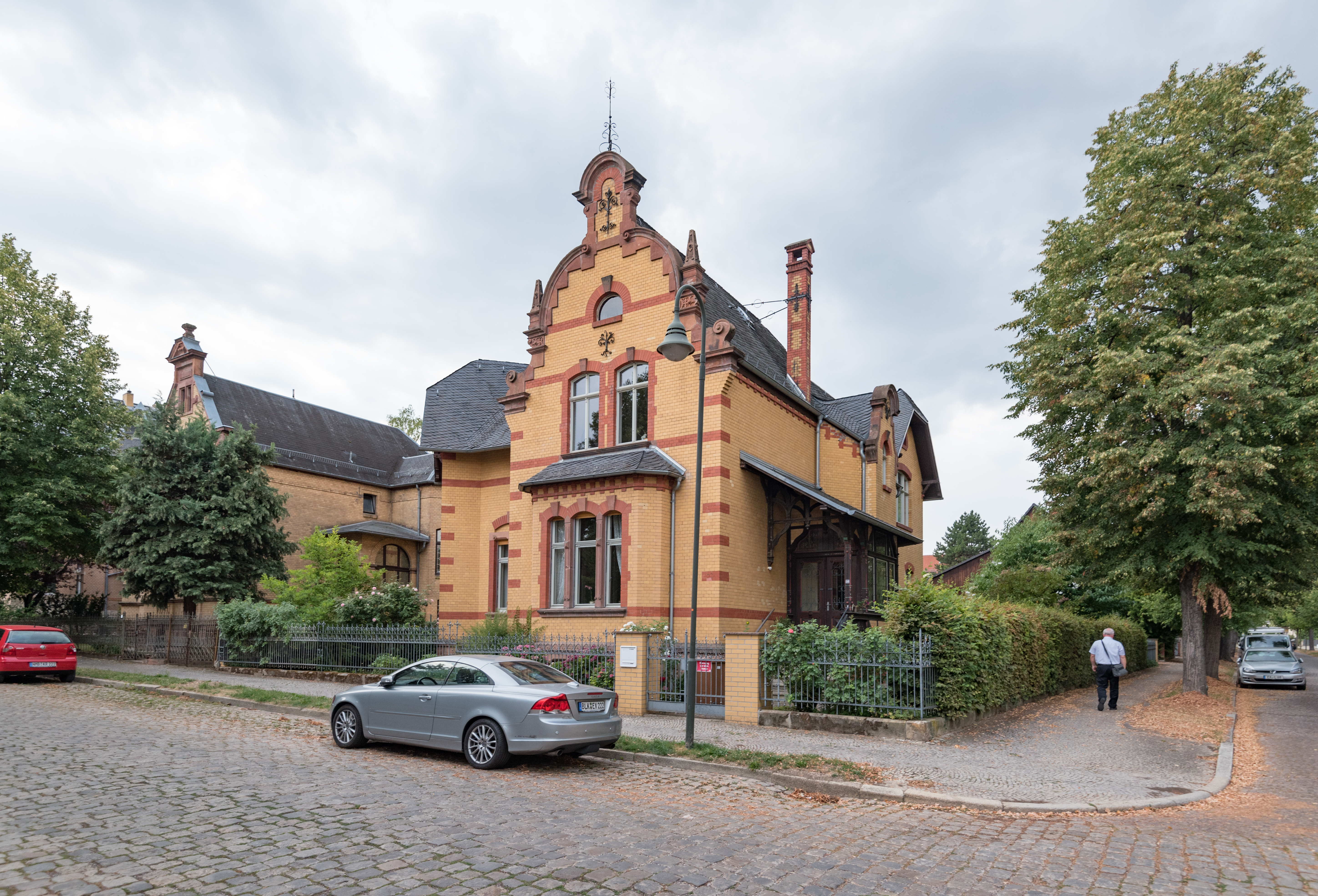 Naumburg (Saale), Buchholzstraße 40